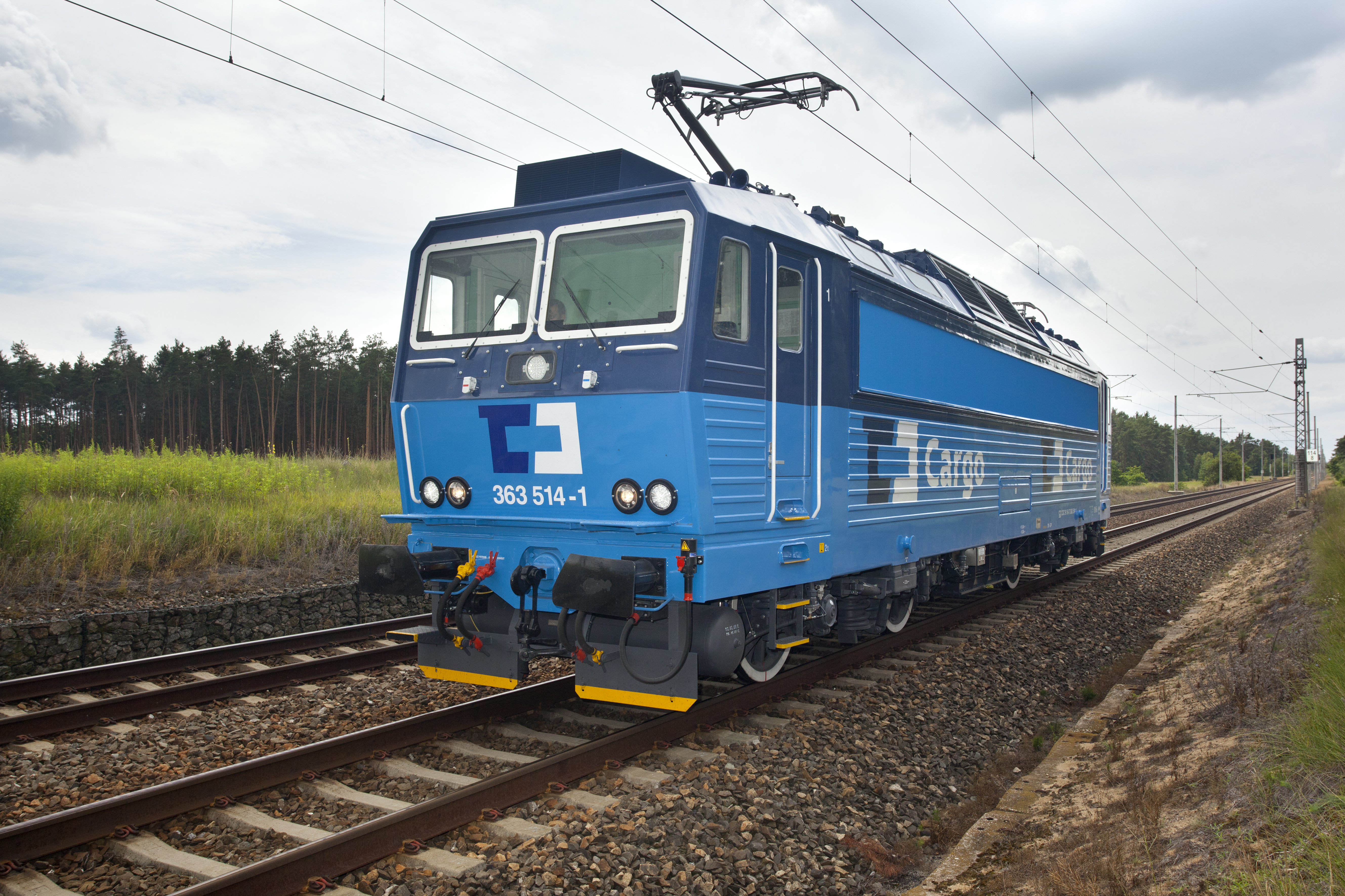 Modernizovaná elektrická lokomotiva, nyní pod označením 71 Em